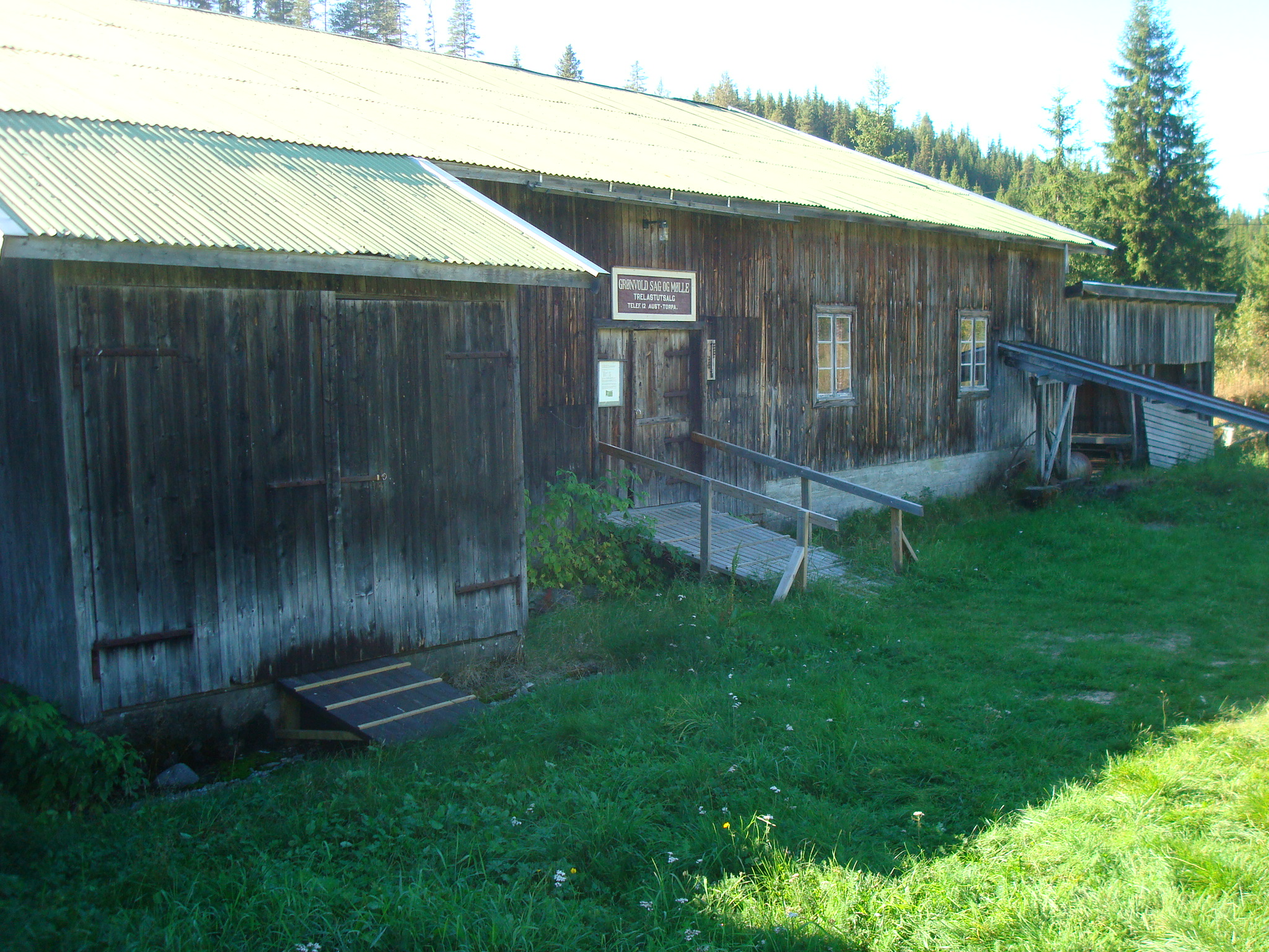 Grønvold sag og mølle i Torpa